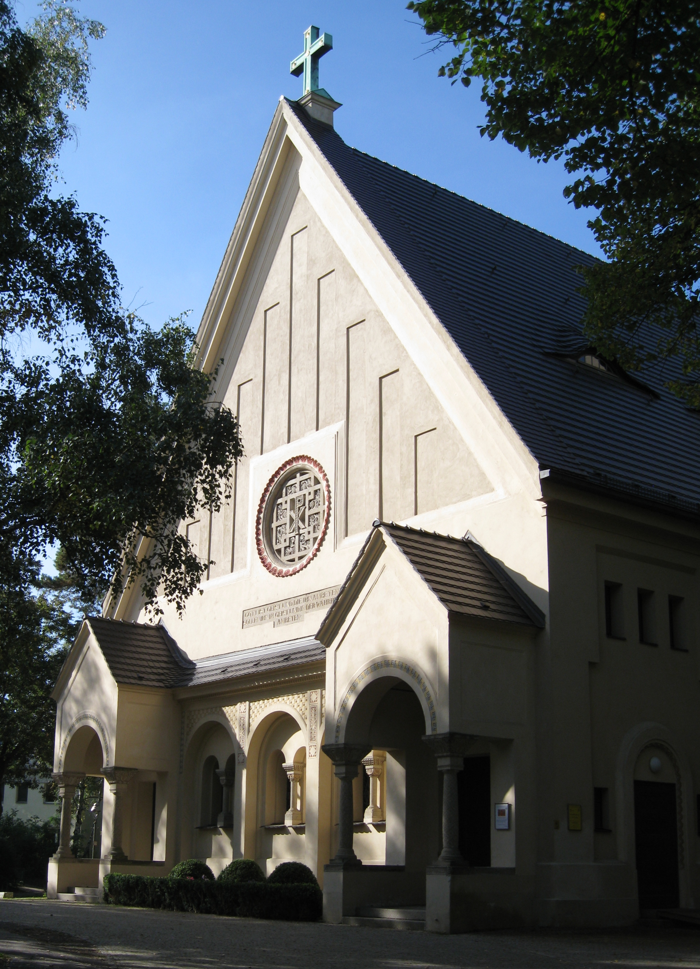 Blick auf die Portale der Johanneskirche Schlachtensee